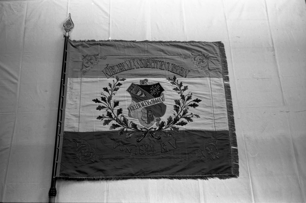 Vereinsfahne vom Kieler Männer-Turnverein (MTV) von 1844 e.V.